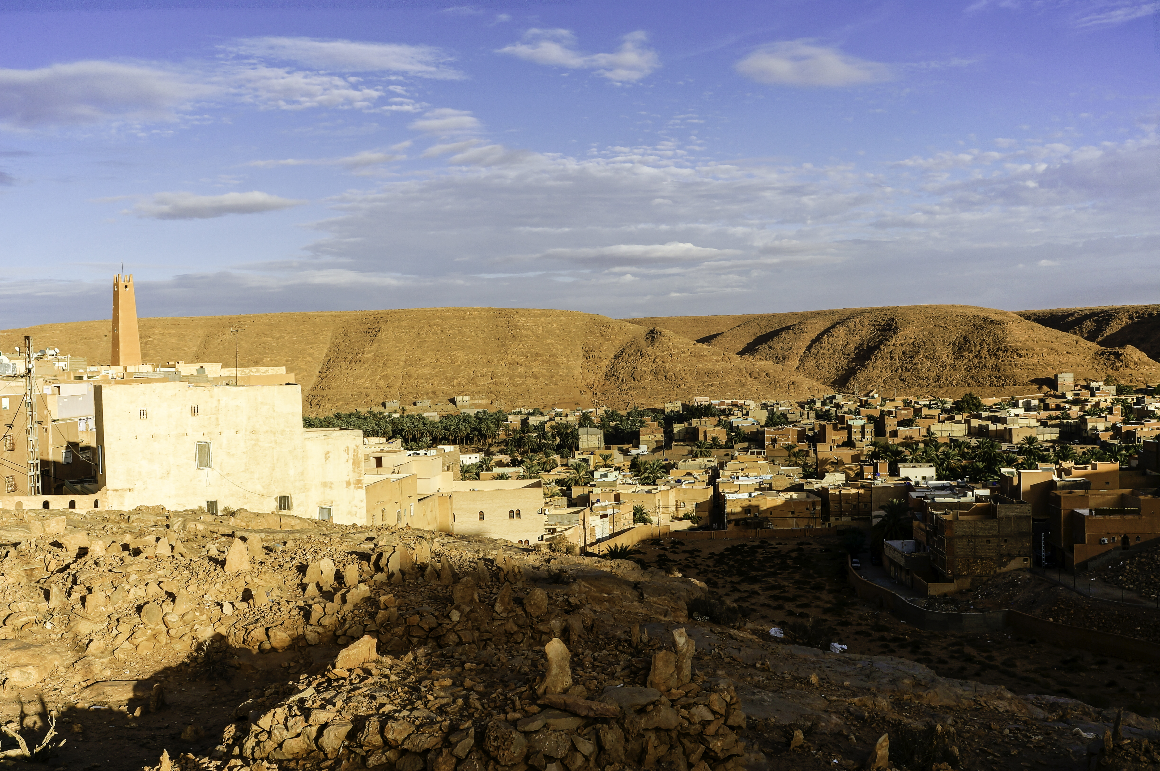 Ghardaia